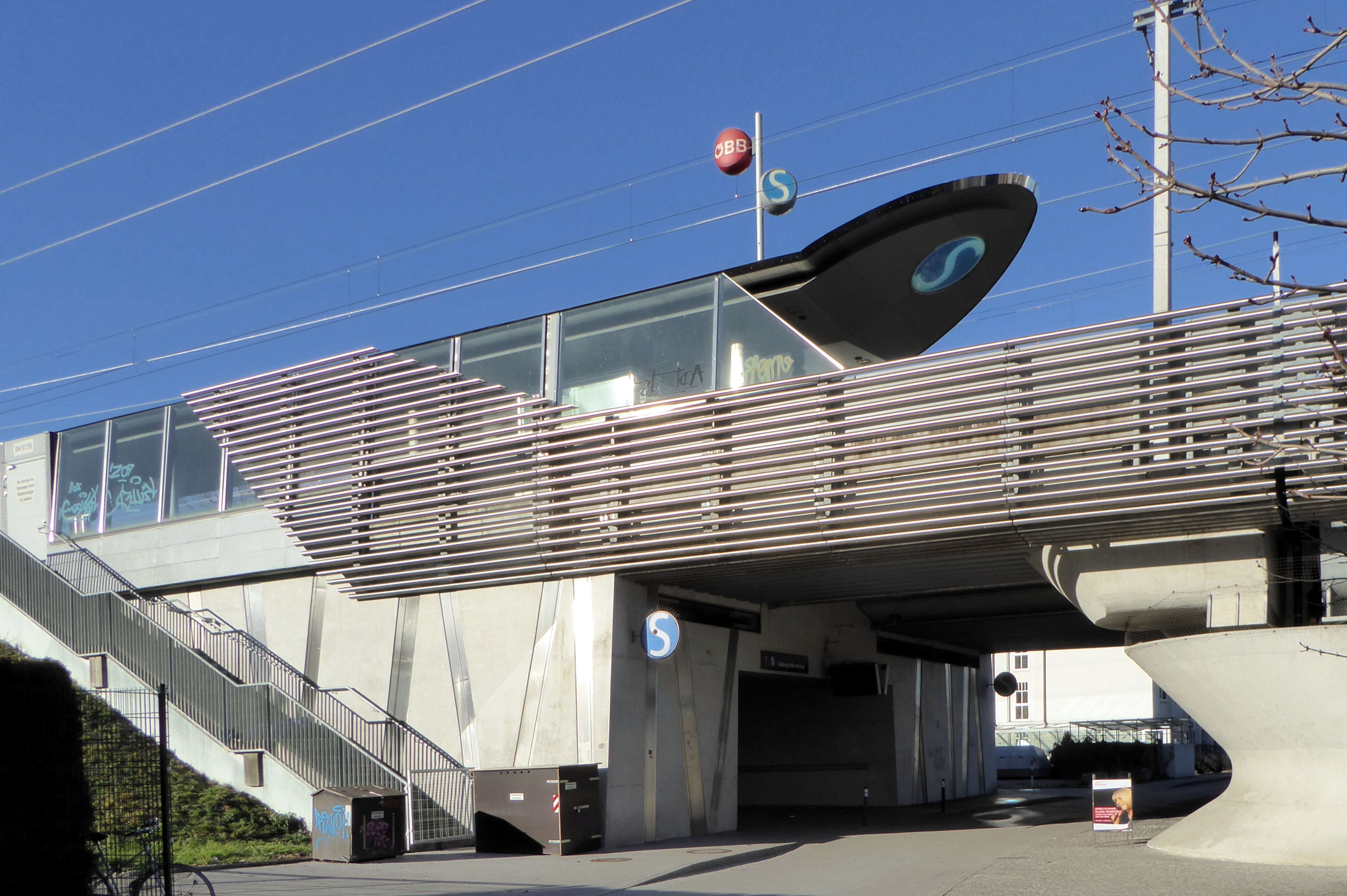 Boarisch: Da Soizburga S-Bahhof Mujn-Oidstod.